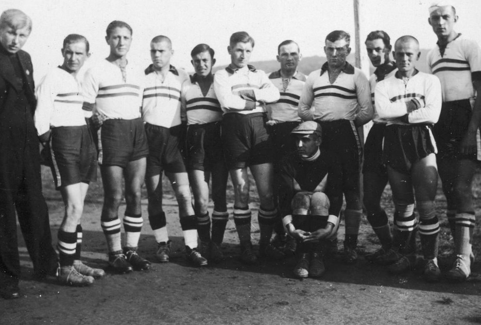 Футбольна команда клубу "Леґіон" Тернопіль